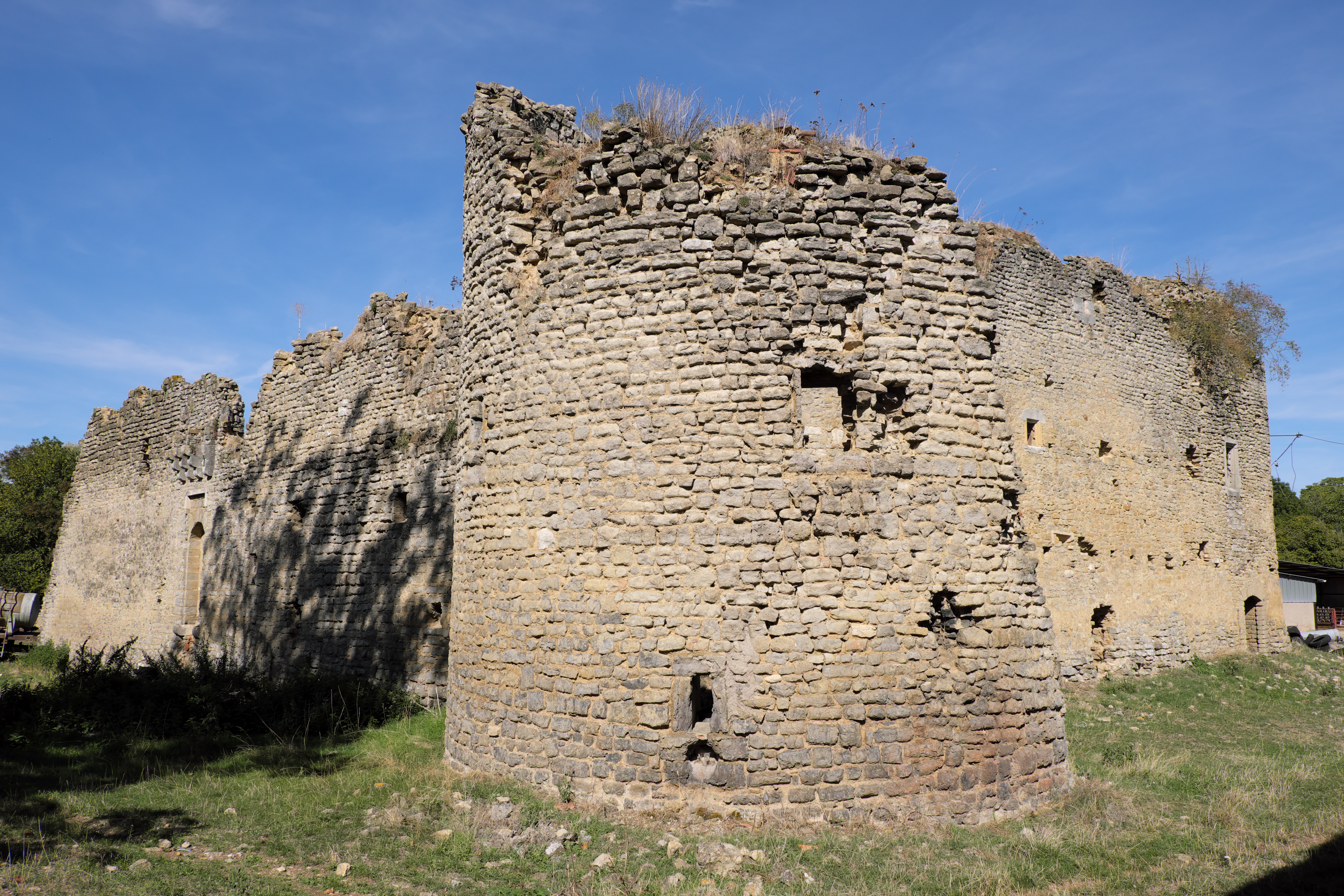 Ruines de la maison forte de Thézey-Saint-Martin en Meurthe-et-Moselle. .